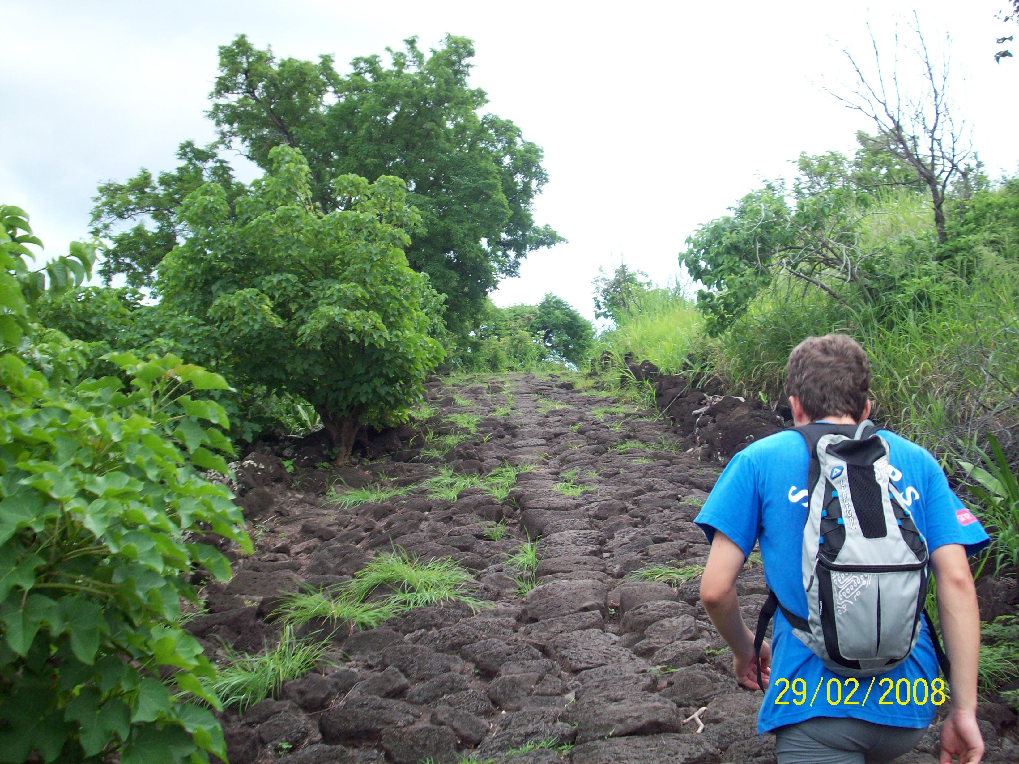 Les pavés du Chemin Crémont